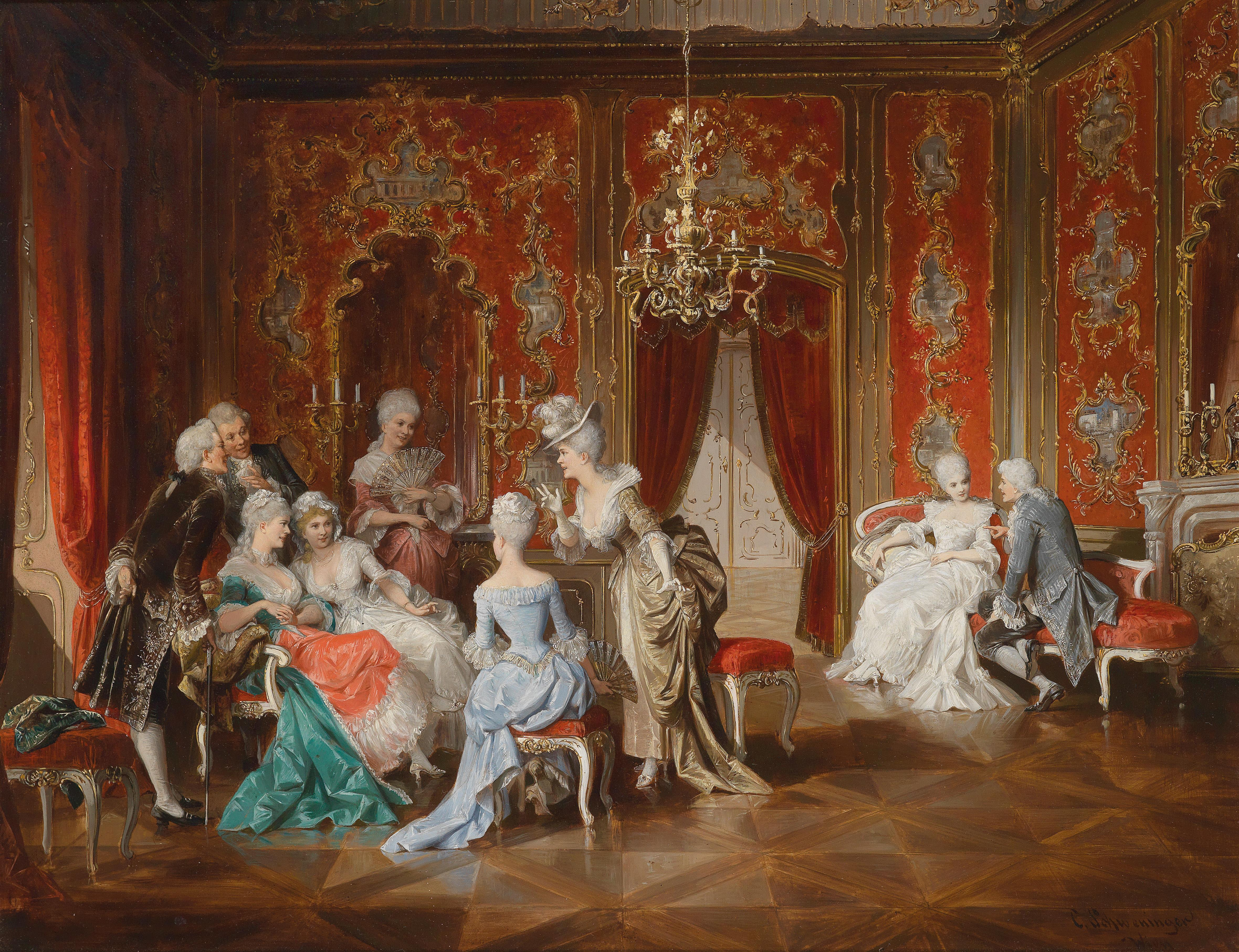 Klatsch und Tratsch im Salon